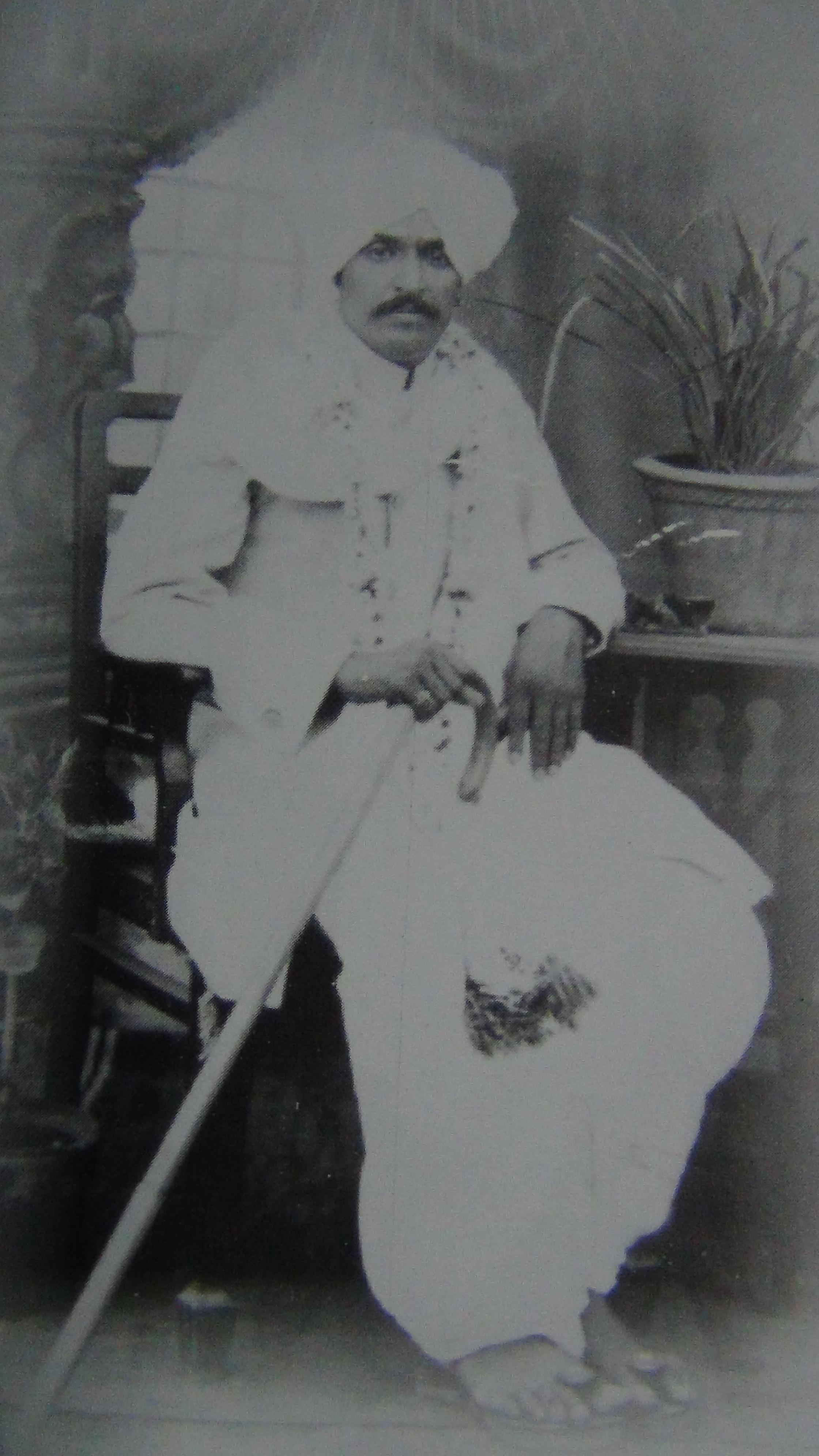 Abaji Tubaji Sanap known as Bhagawanbaba was a Varkari and Hindu saint from Maharashtra